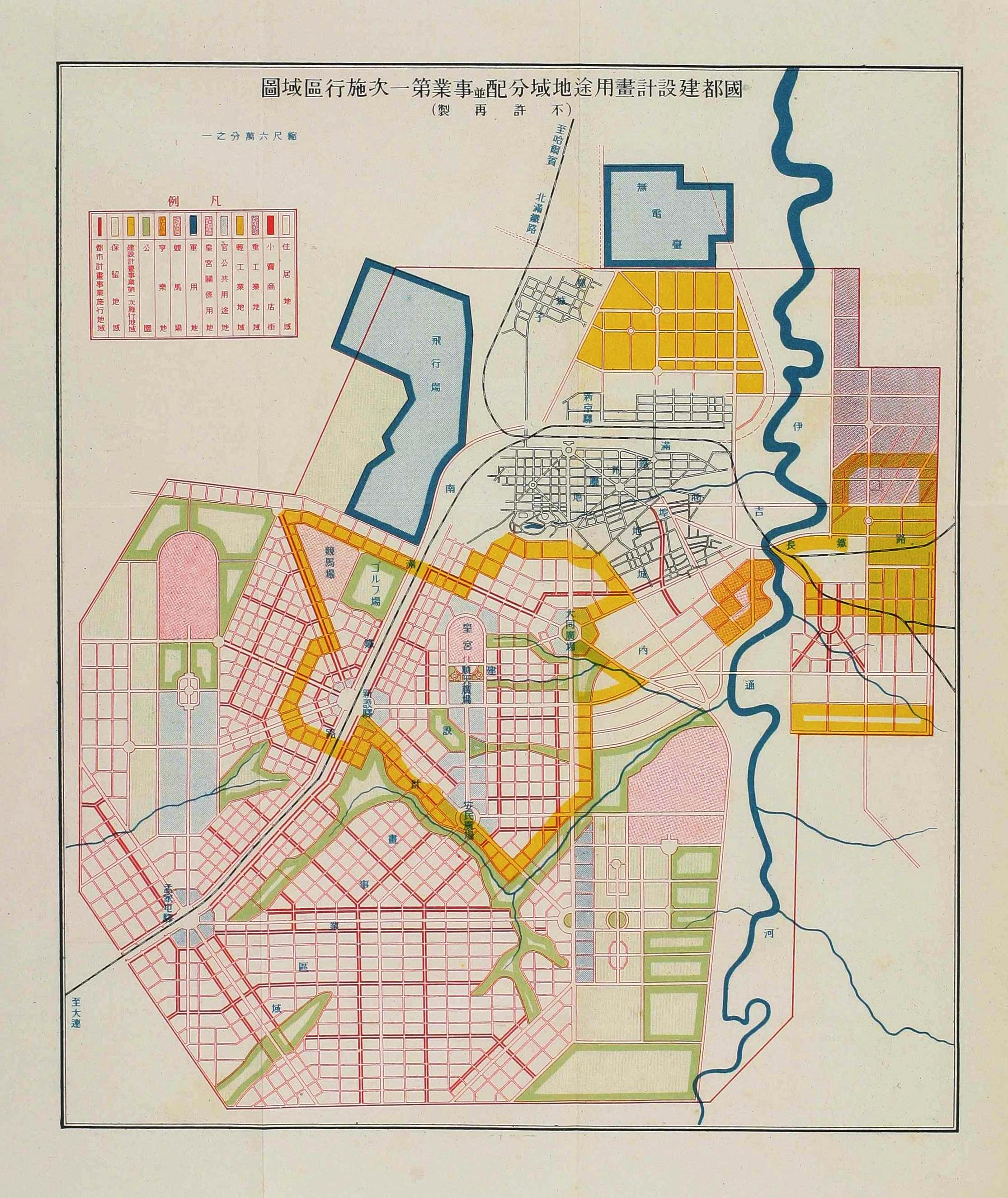 新京特別市公署『新京市政概要』に付属する、国都建設計画事業第一次施行区域図